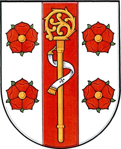 znak, Kožichovice, okres Třebíč